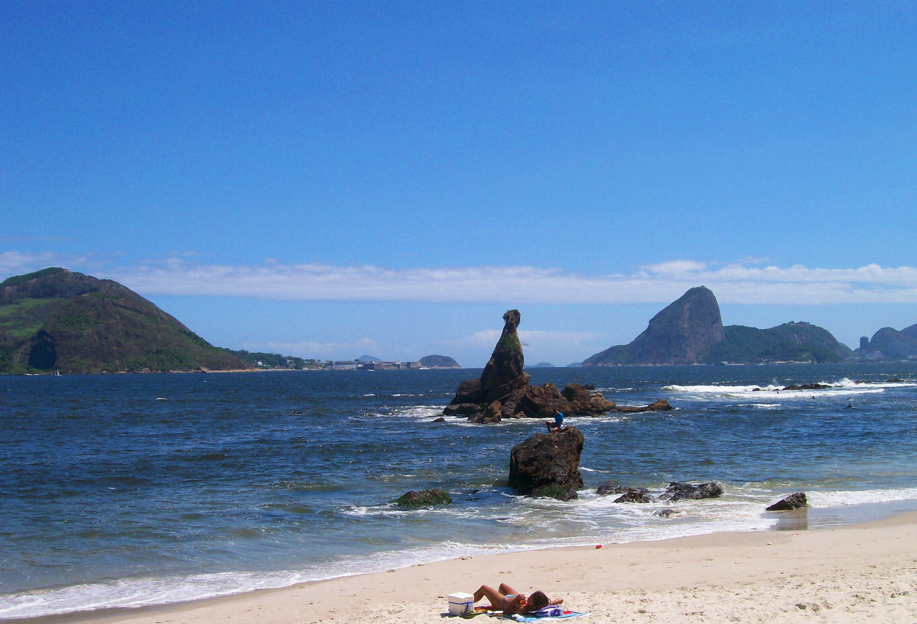 Pedra do Indio